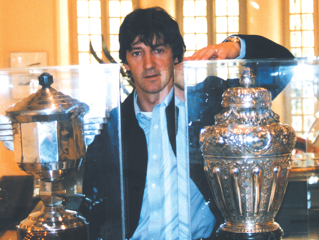 José Mari Bakero. Futbolista español